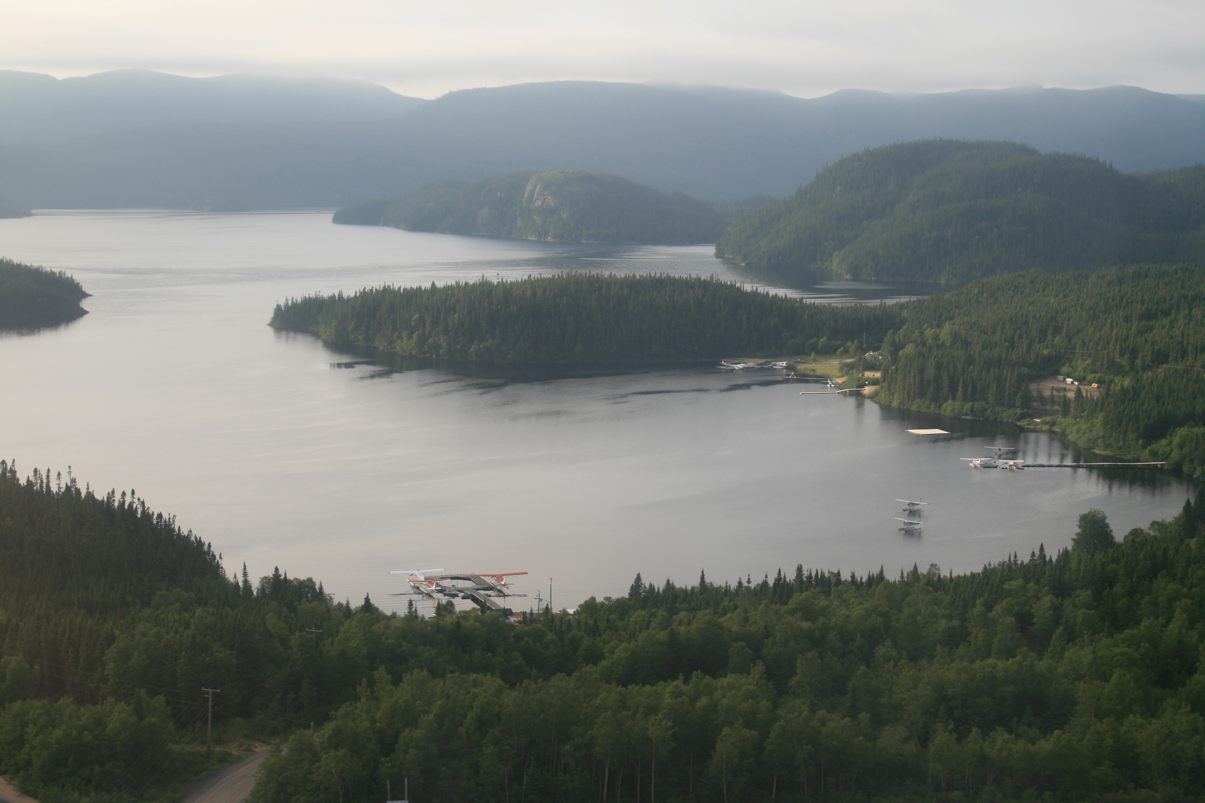 Kami Property (Lake View)